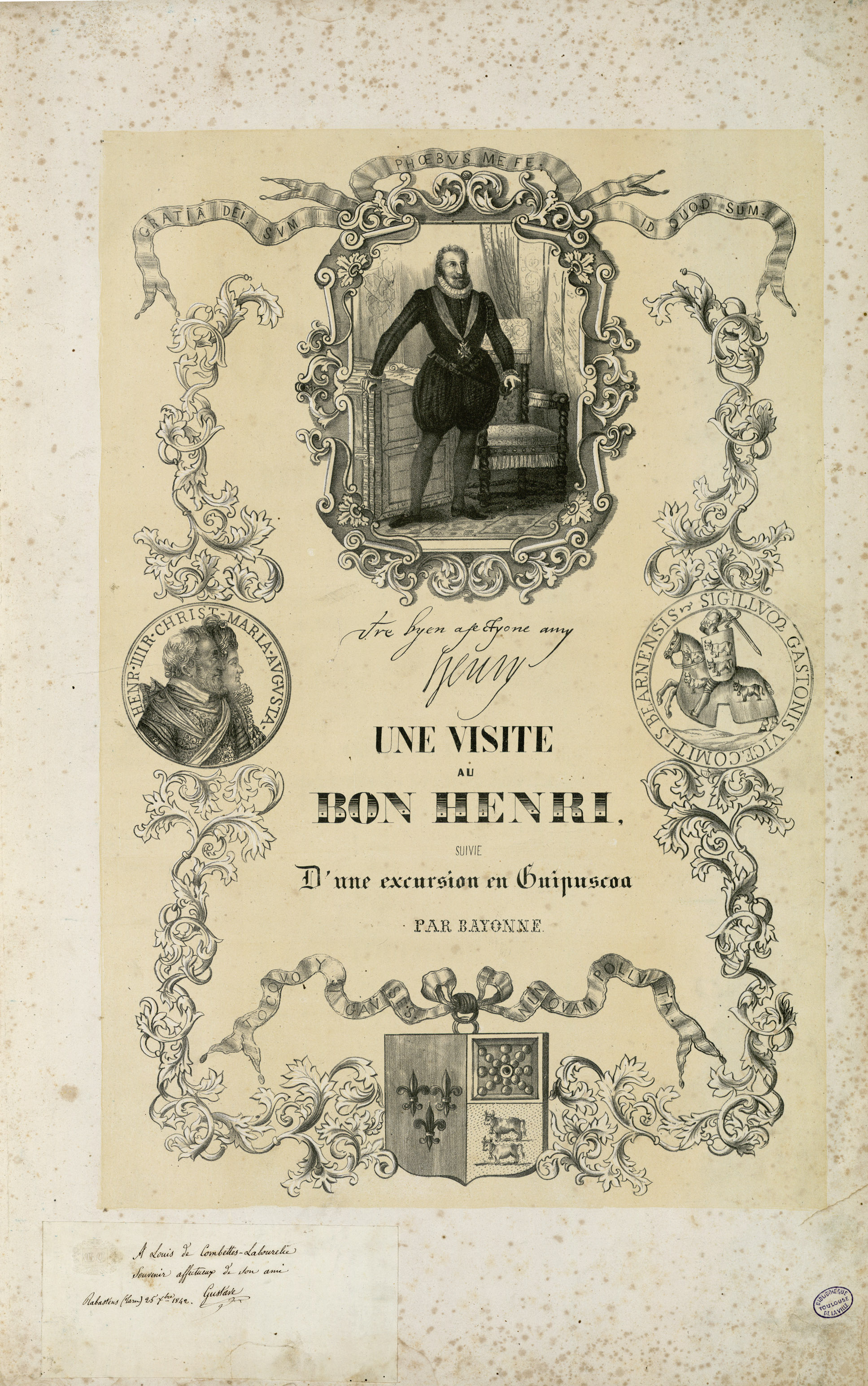 Fait partie d'un recueil de 15 planches lithographiées en camaïeu avec titre lithographié Ancely, René (1876 - 1966). Possesseur